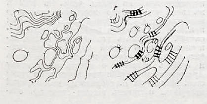 Данное изображение было использовано в статье «Бергштрих» опубликованной в четвёртом томе «Военной энциклопедии», который был издан книгоиздательским товариществом Ивана Дмитриевича Сытина в 1911 году в столице Российской империи городе Санкт-Петербурге.